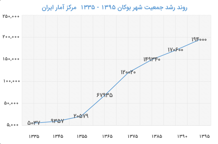 نمودار سیررشد جمعیتی شهر بوکان از 1335 تا 1395